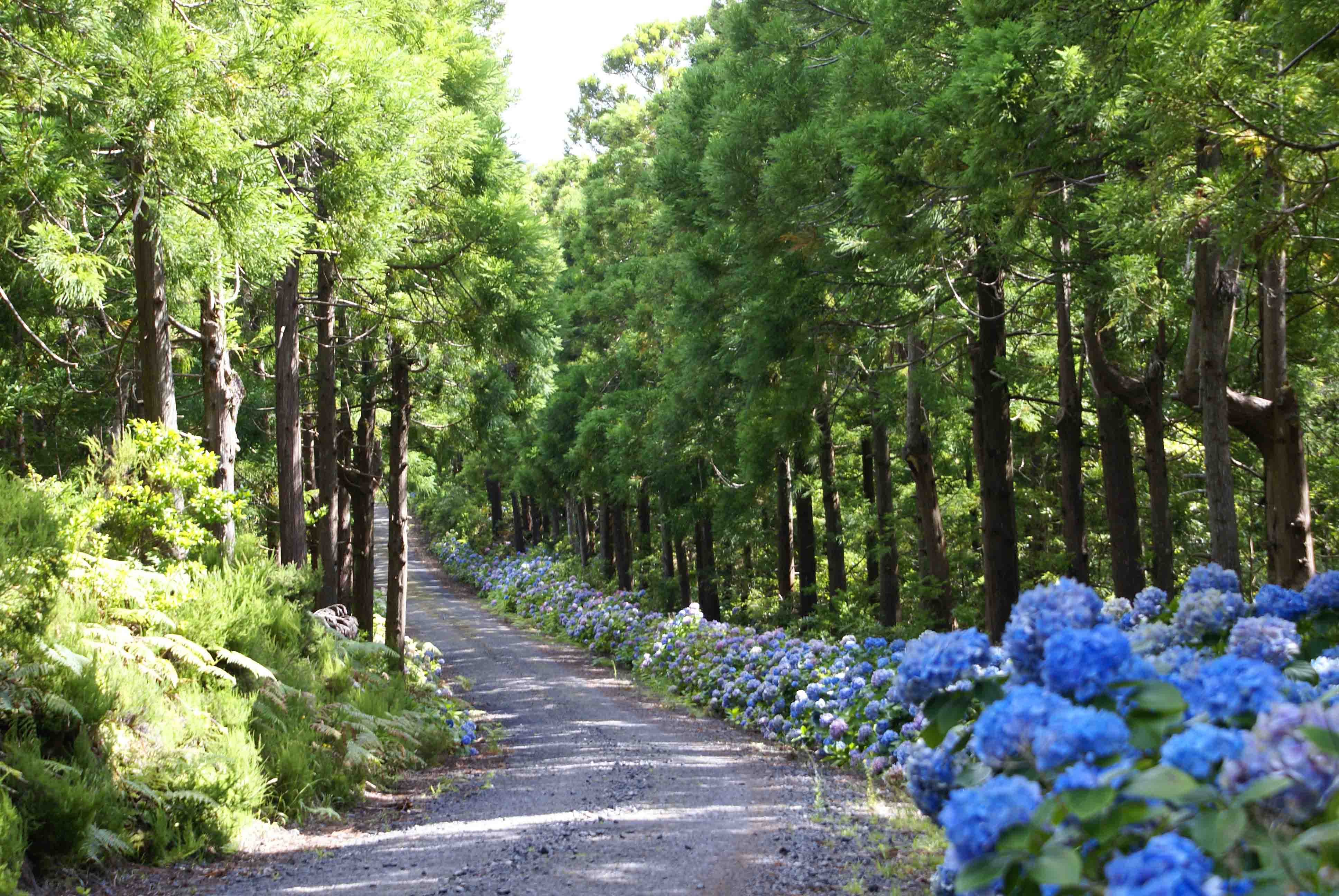 Parque Florestal da Mata da Serreta, Interior da ilha Terceira, Açores, Portugal